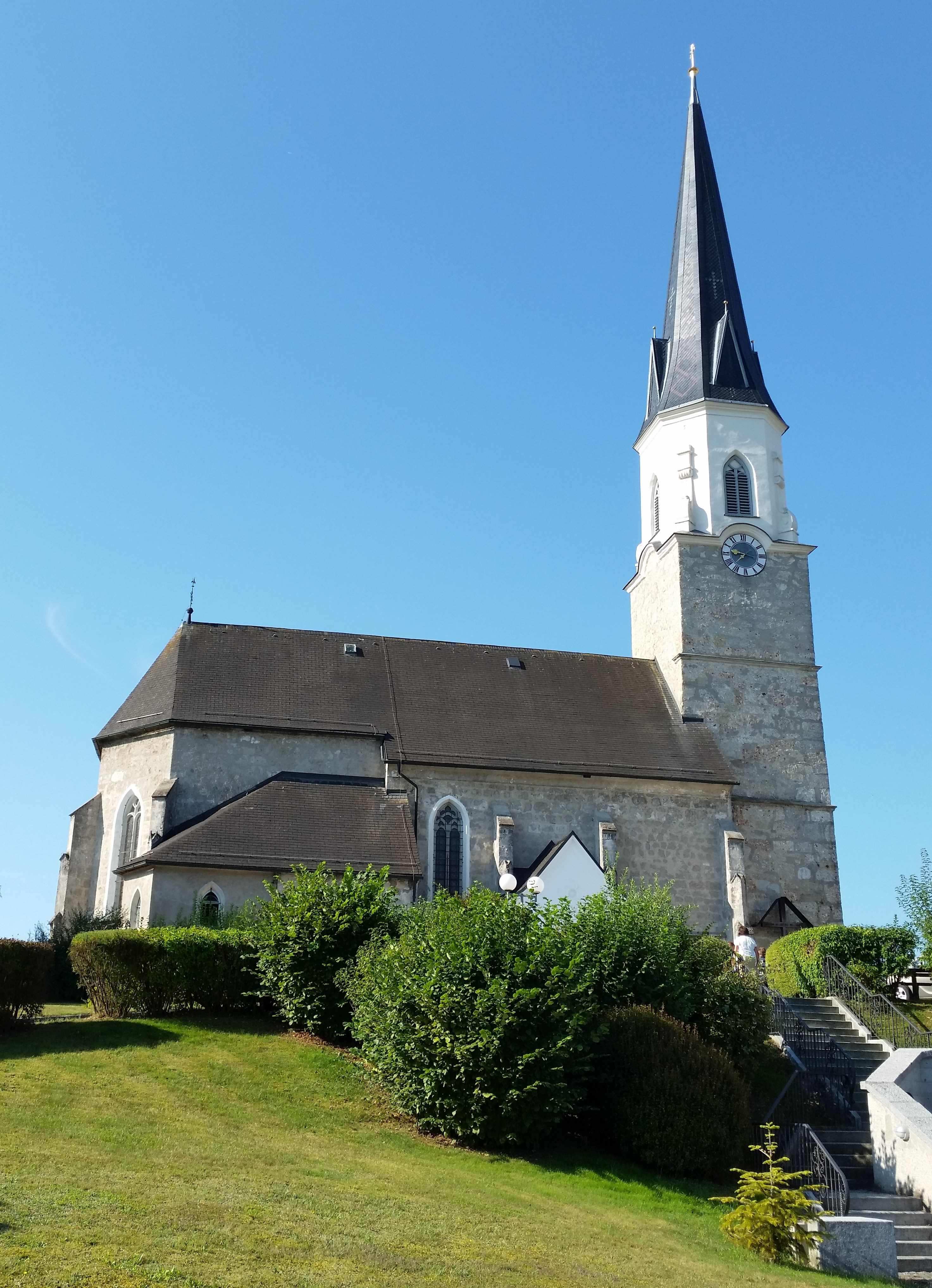 Kath. Pfarrkirche hl. Peter und Paul sowie Friedhof